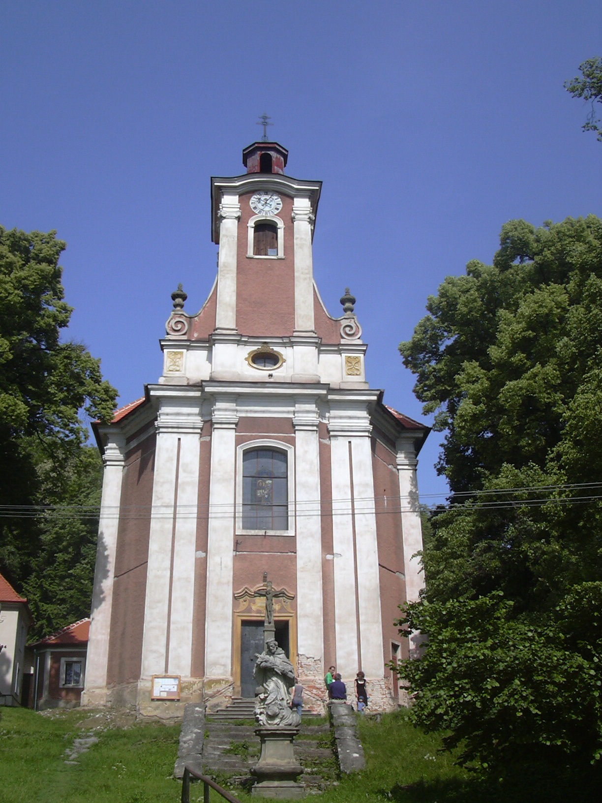 Farní kostel sv.Isidora Luleč (Vyškov- czech republic)